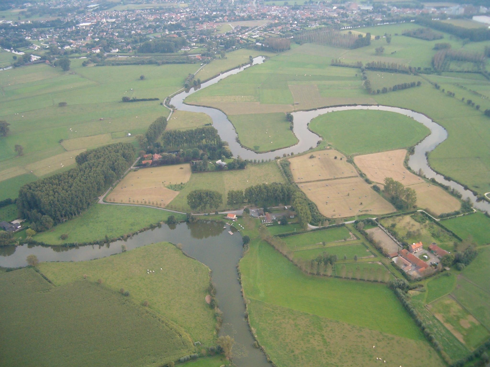 Vosselare Put